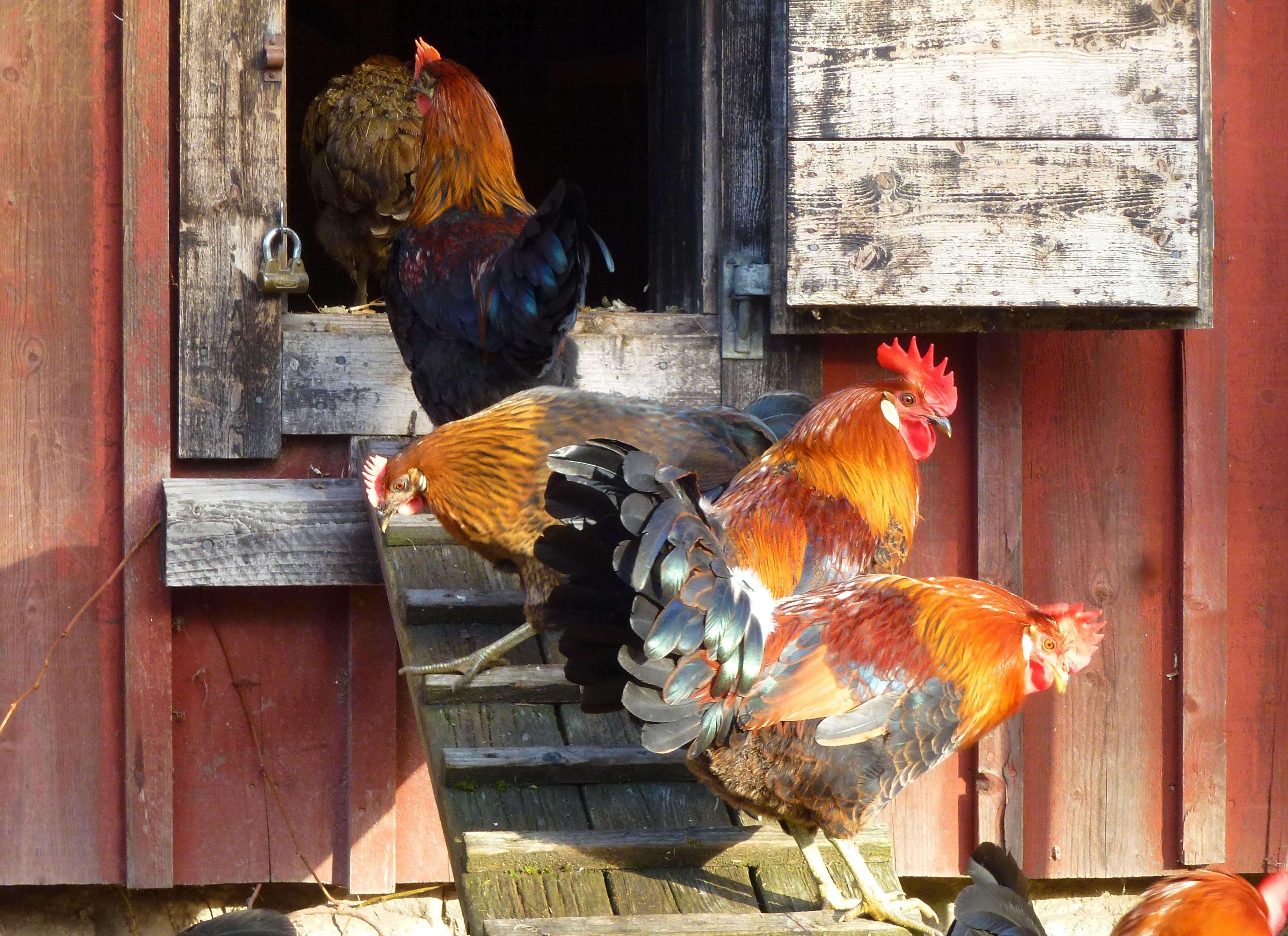 Torekällberget tuppar